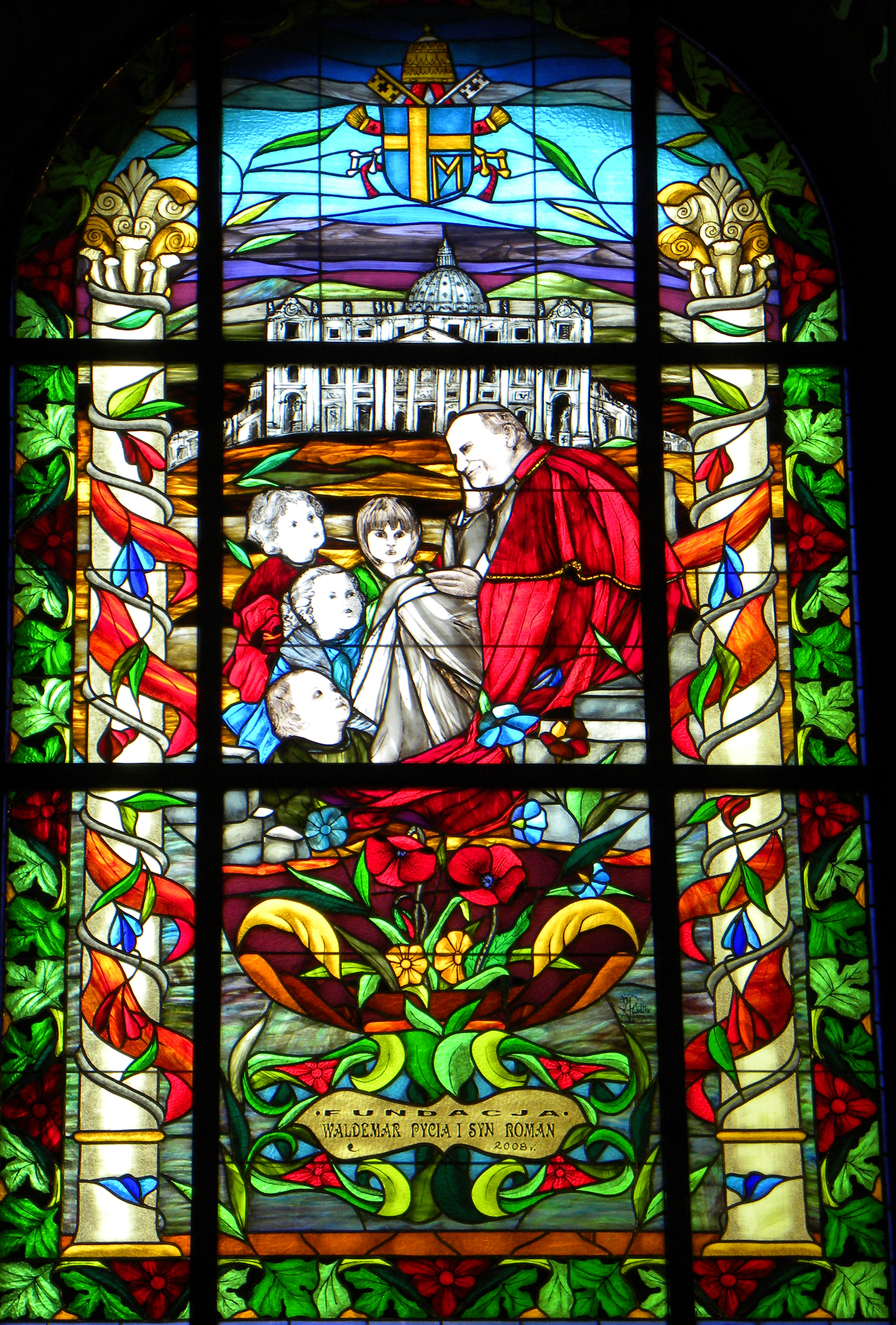 Witraz przedstawiający JPII w katedrze w Bielsku-Białej